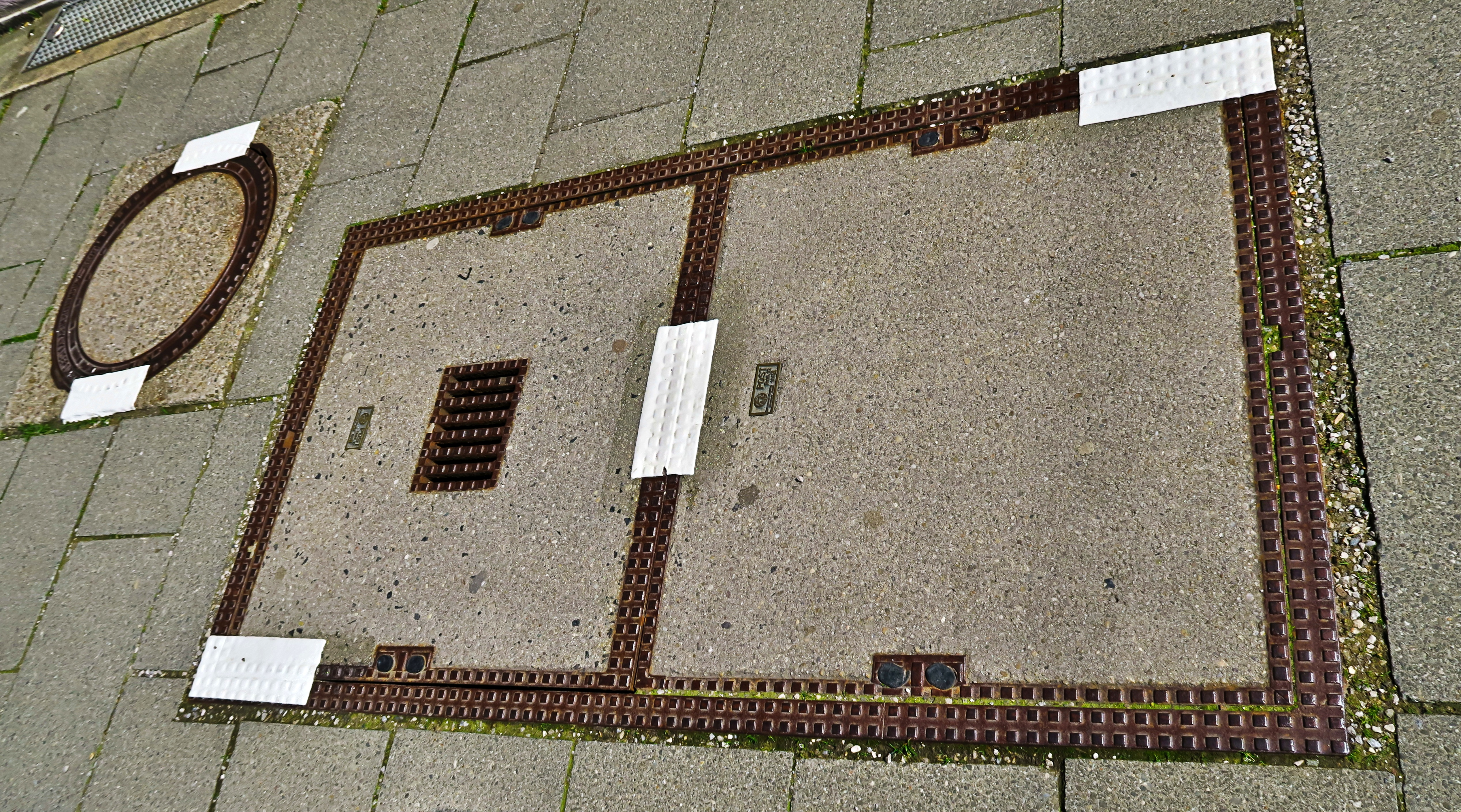 Deutschland, Bayern, Oberbayern, Gemeinde und Landkreis Garmisch-Partenkirchen, zugeschweißte Kanaldeckel in Germisch-Partenkirchen anläßlich des G7-Gipfels in der Gemeinde Krün auf Schloß Elmau 7. bis 8. Juni 2015